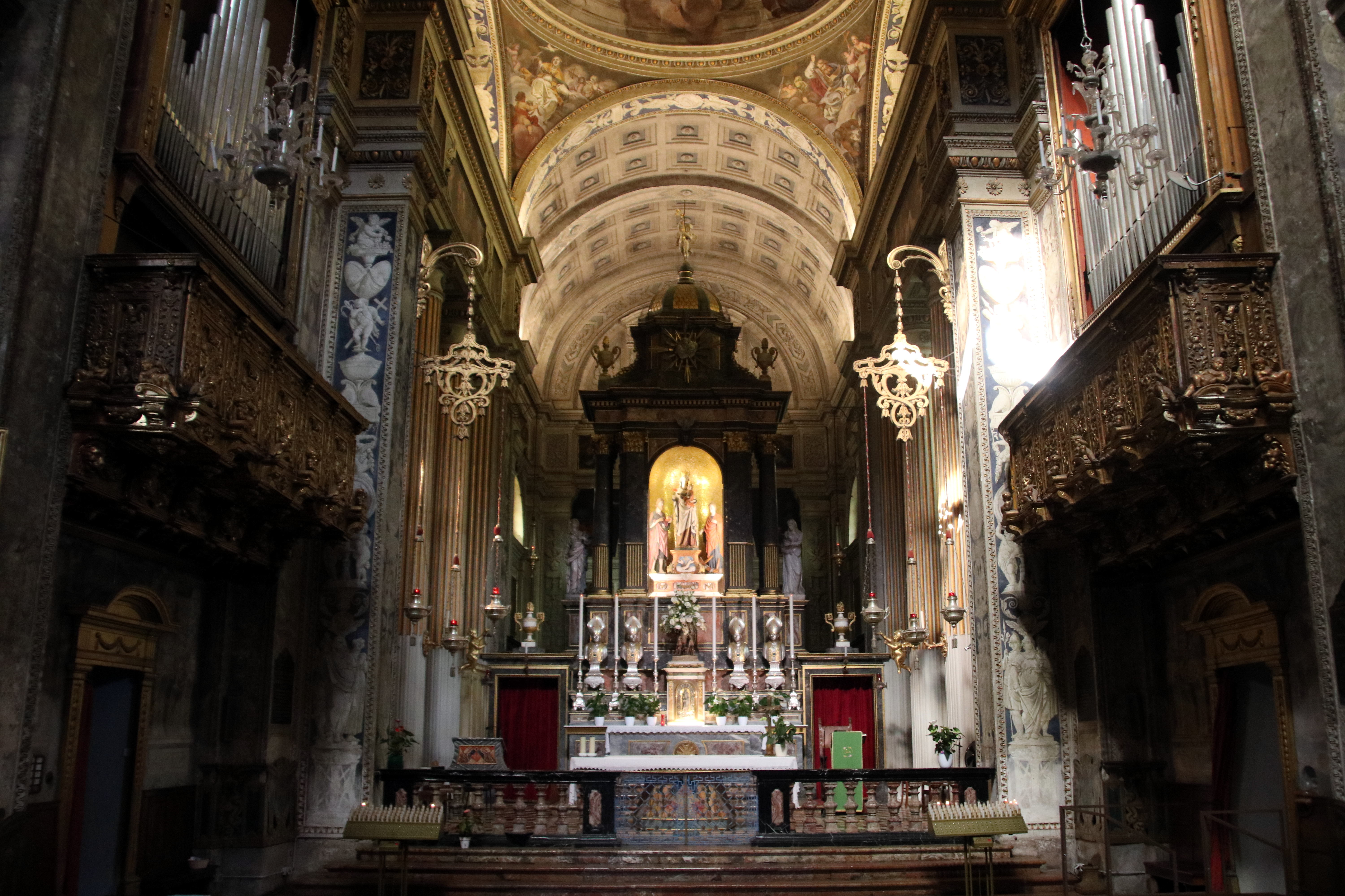 basilica di Santa Maria di Campagna This is a photo of a monument which is part of cultural heritage of Italy.